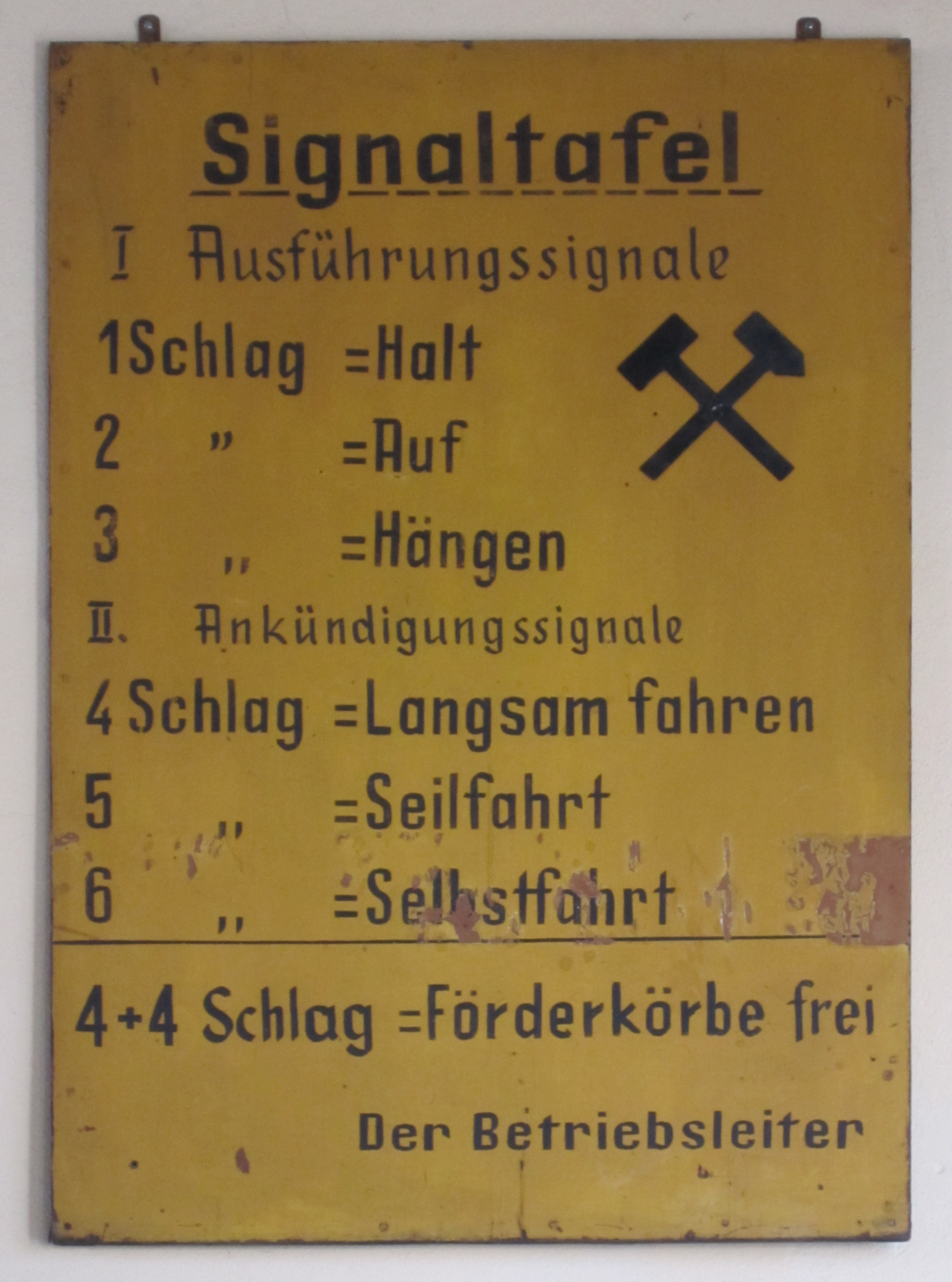 Schachtsignaltafel im Kaliwerk Glückauf Sondershausen. Sondershausen, Thüringen, Deutschland.